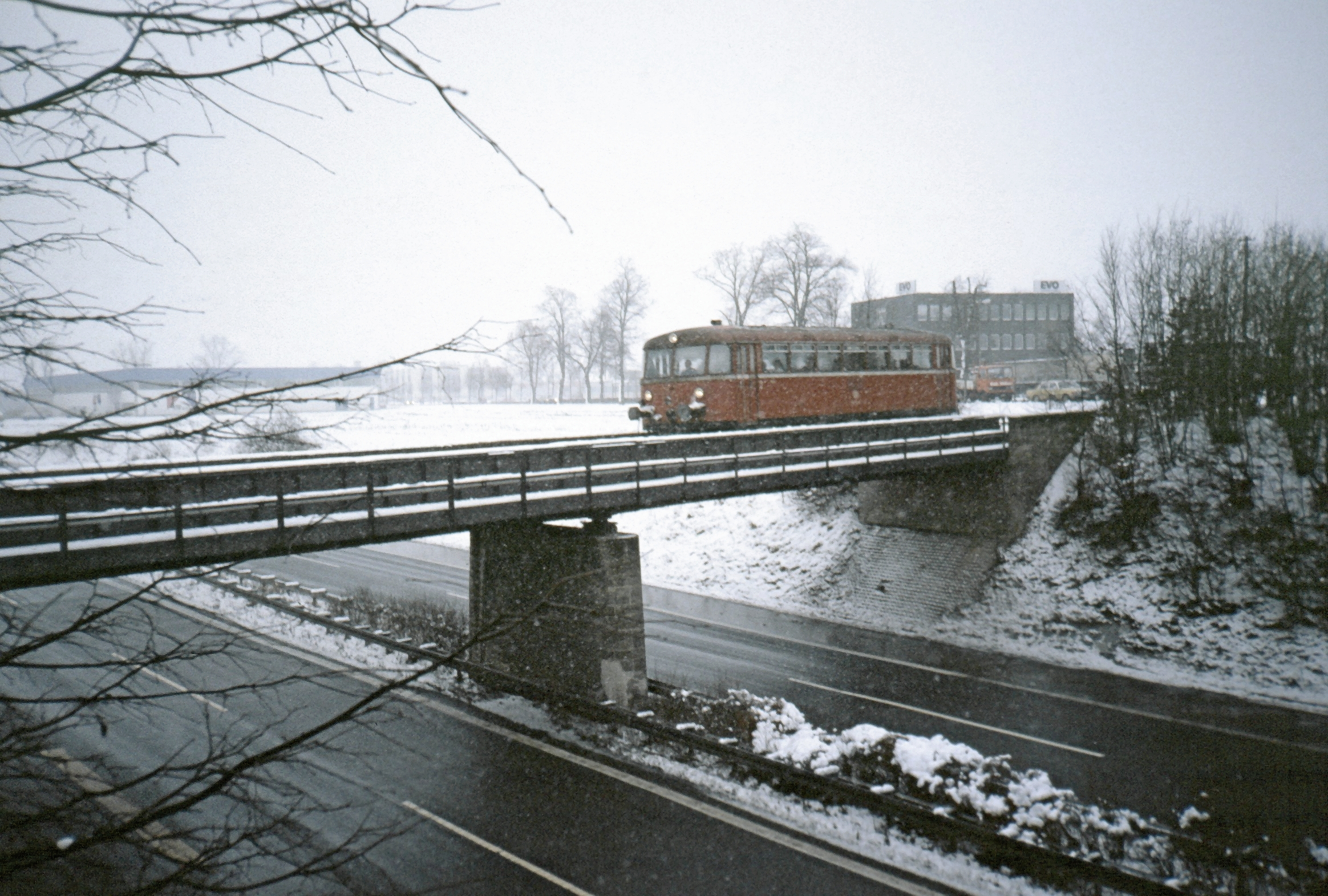 Bayreuth, Laineck Autobahnbrücke (Scan von Dia)